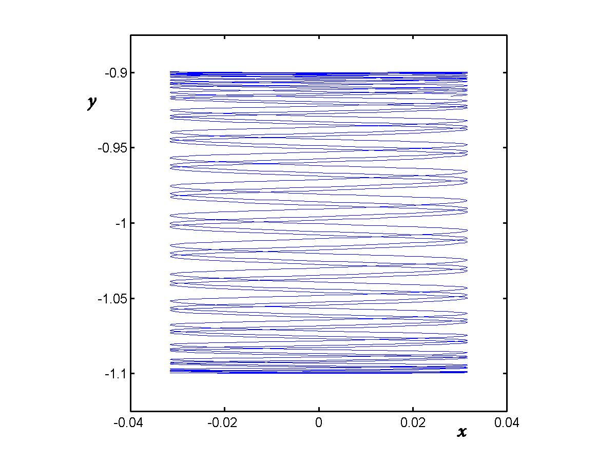 Маятник Капицы, колебания в нижней точке.